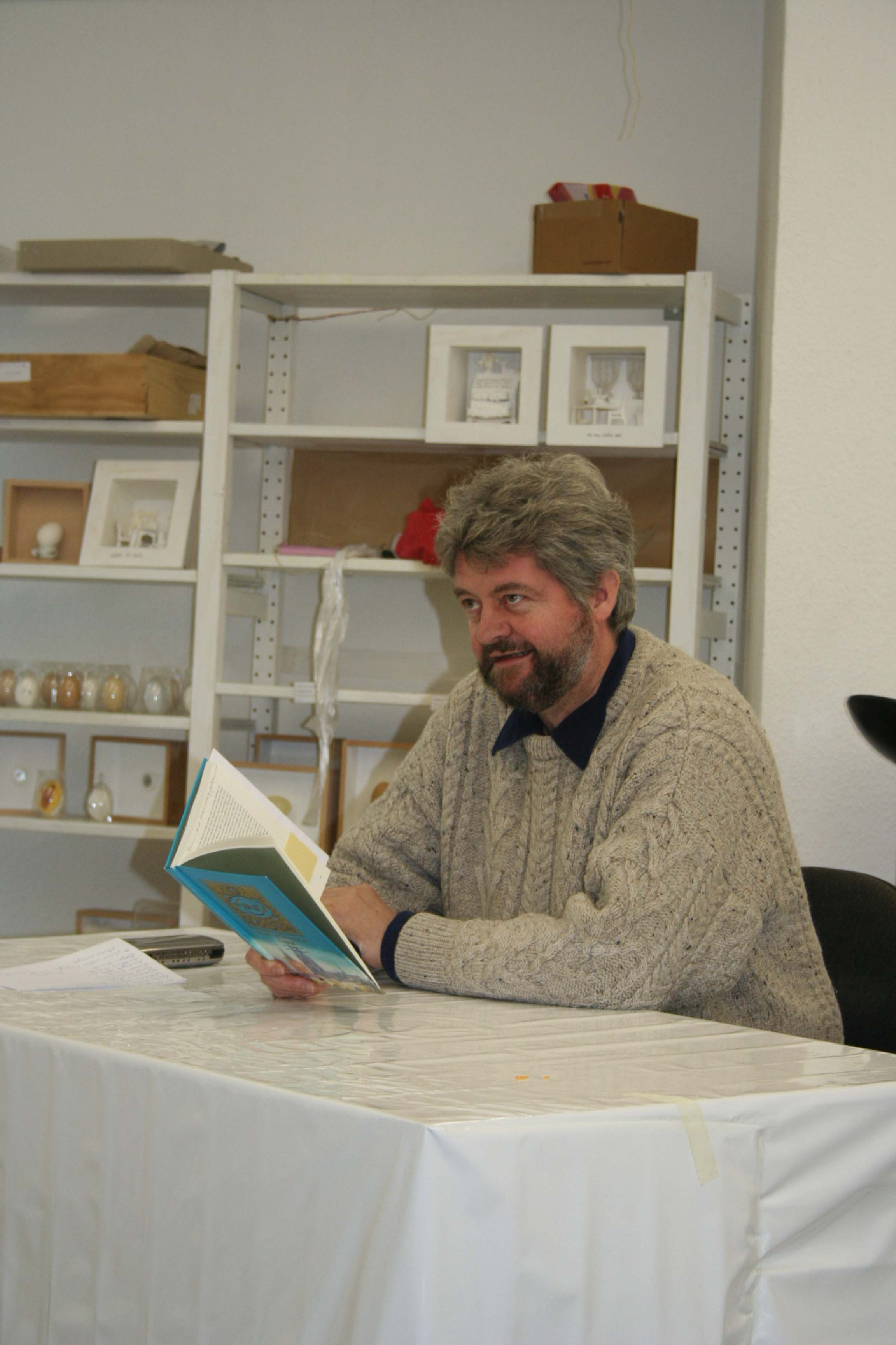 Andreas Rumler bei einer Lesung im Lenau-Forum, Köln-Ehrenfeld, 27. 12. 2009